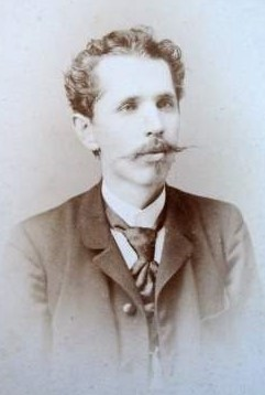 Fotografie architekta Josefa Seyfrieda.